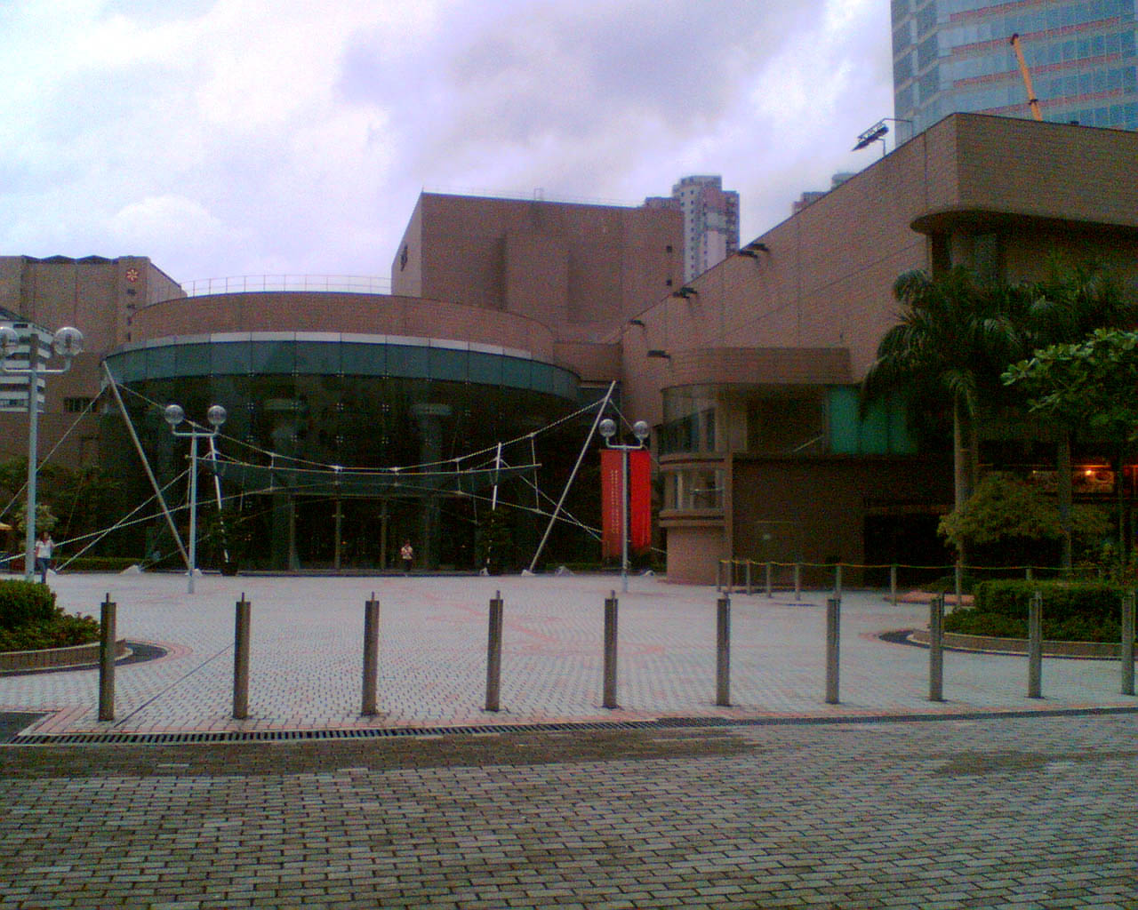 葵青區葵青劇院